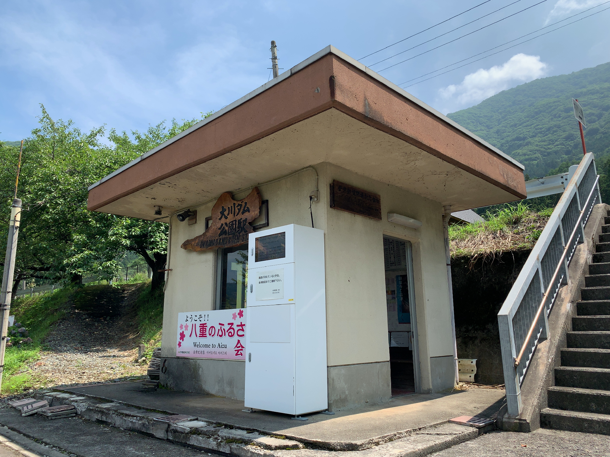 会津鉄道 大川ダム公園駅 駅舎